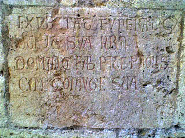 Lapida que se encuentra en el abside exterior de la iglesia de Fitero Navarra España